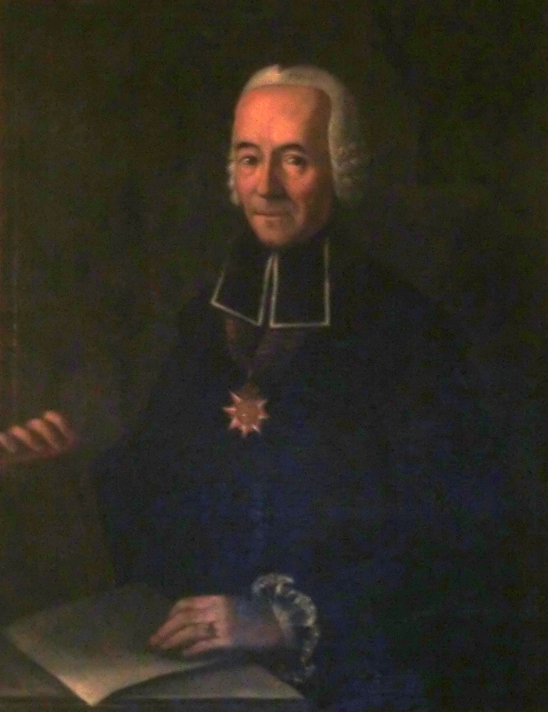 Portrét Vavřince Slavíka, generálního vikáře litoměřické diecéze kolem roku 1790